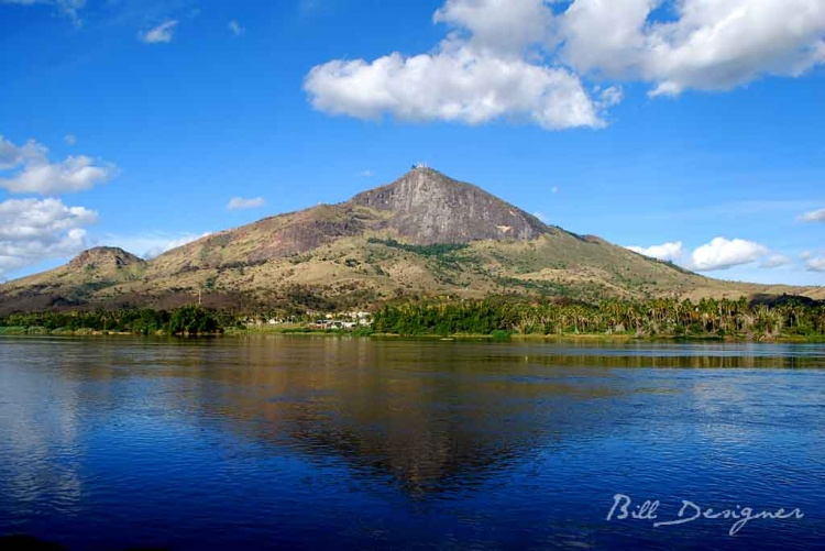 Pico do Ibituruna localizado na Cidade de Governador Valadares